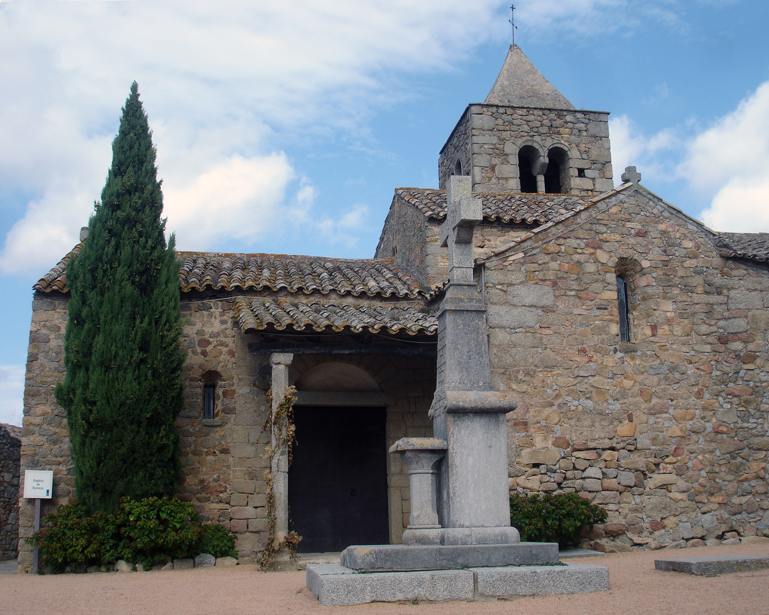 Eglèsia de Sant Martí de Romanyà (Girona, Catalunya, Espanya)